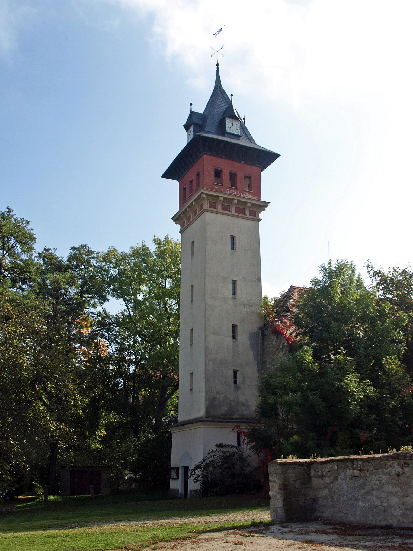 Wasserturm in Drehsa (Ortsteil von Weißenberg) Hornjoserbsce: Wodarnja Droždźijskeho hrodu